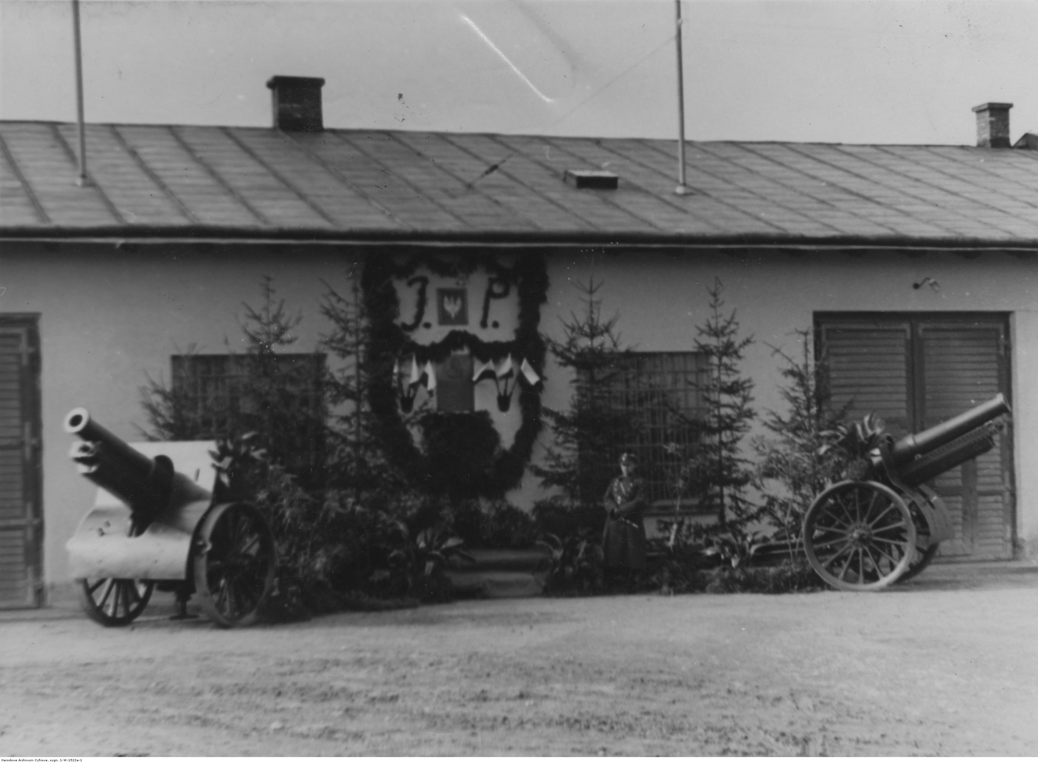 Tablica pamiątkowa ku czci Marszałka Józefa Piłsudskiego w parku samochodowym 1 Pułku Artylerii Motorowej w Stryju - budynek parku samochodowego, na ścianie którego widnieje tablica. Obok widoczne 155 mm haubice wz. 1917. Koncern Ilustrowany Kurier Codzienny - Archiwum Ilustracji. Sygnatura: 1-W-1522a-1